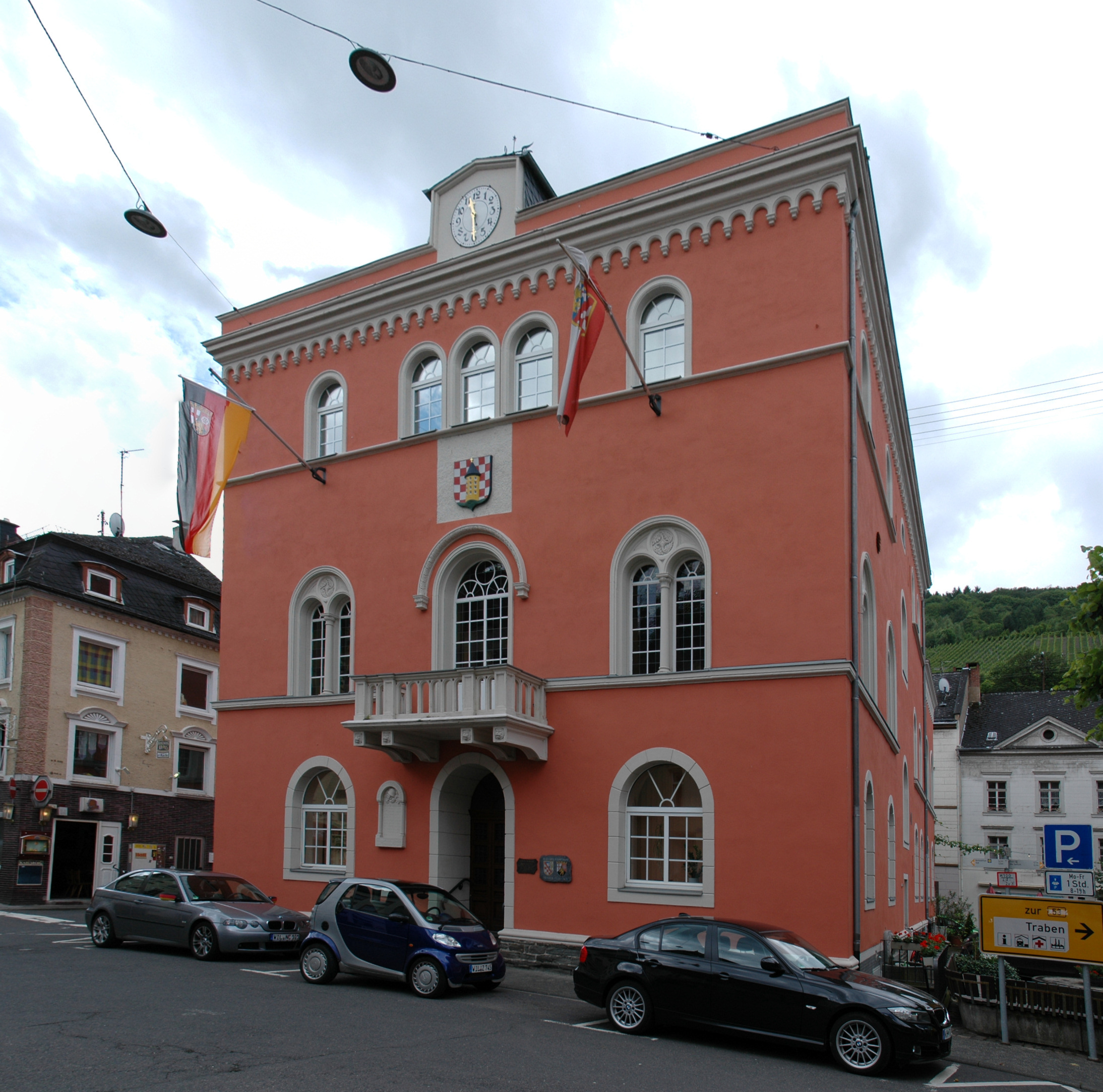 Rathaus von Traben-Trarbach, Am Markt This image was created with Hugin This is a photograph of an architectural monument. It is on the list of cultural monuments of Traben-Trarbach